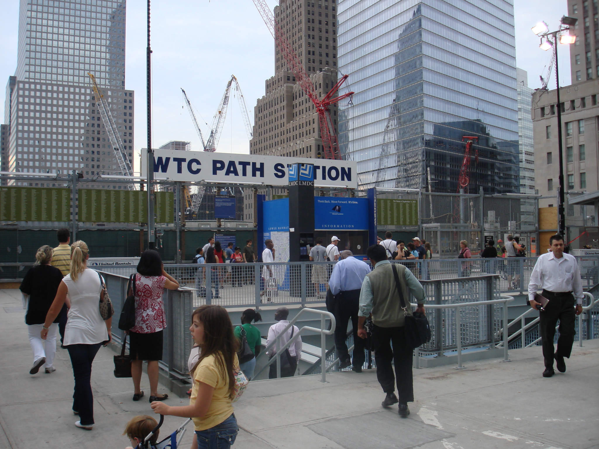 Eingang zur U-Bahnstation am Ground Zero